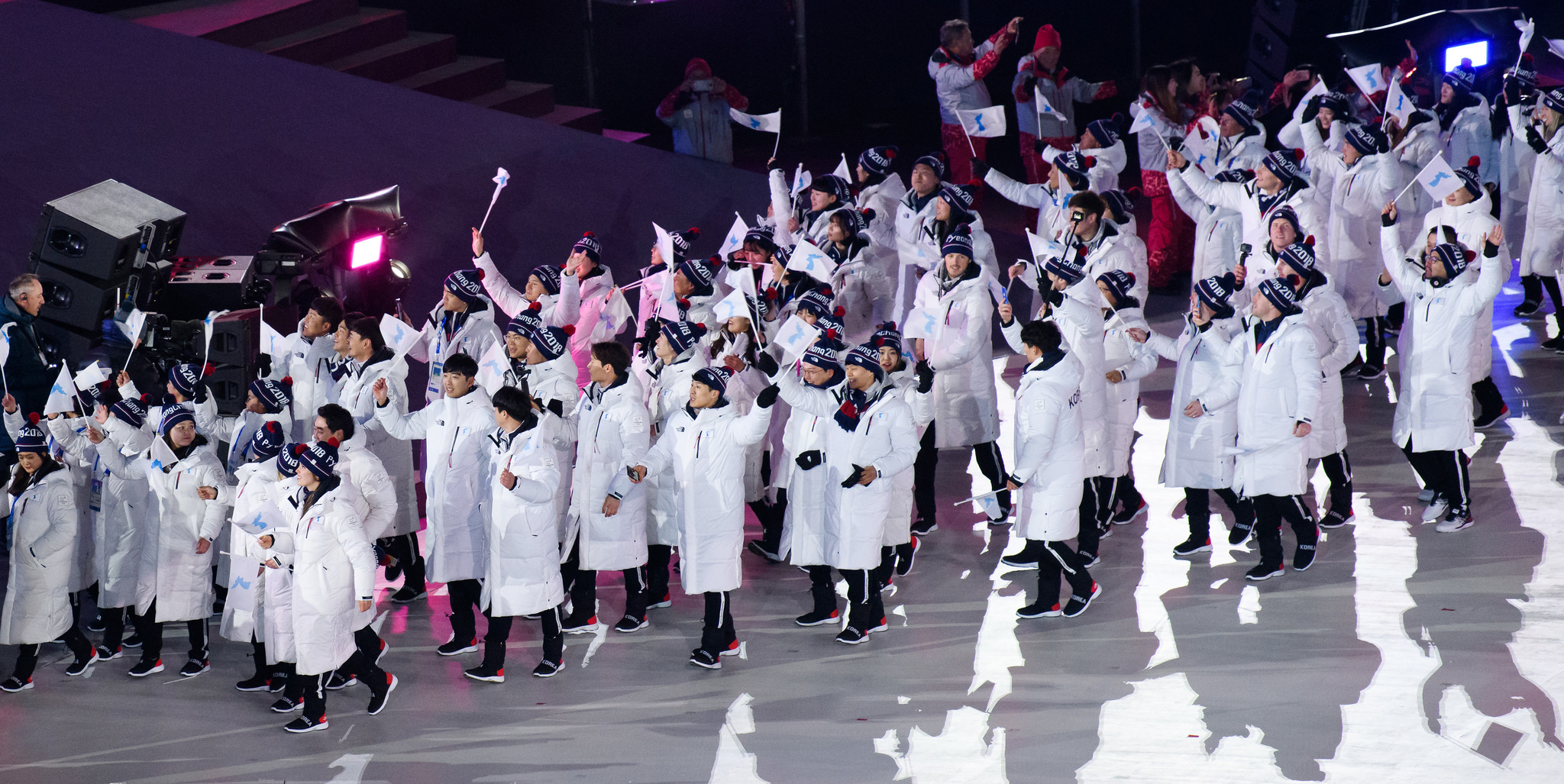 2018 PyeongChang Winter Olympic Games Opening Ceremony February 9, 2018 PyeongChang Olympic Plaza, Pyeongchang-gun, Gangwon-do